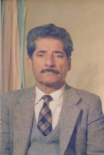 کوردی: دیلان لە دوا قۆناغەکانی تەمەنیدا